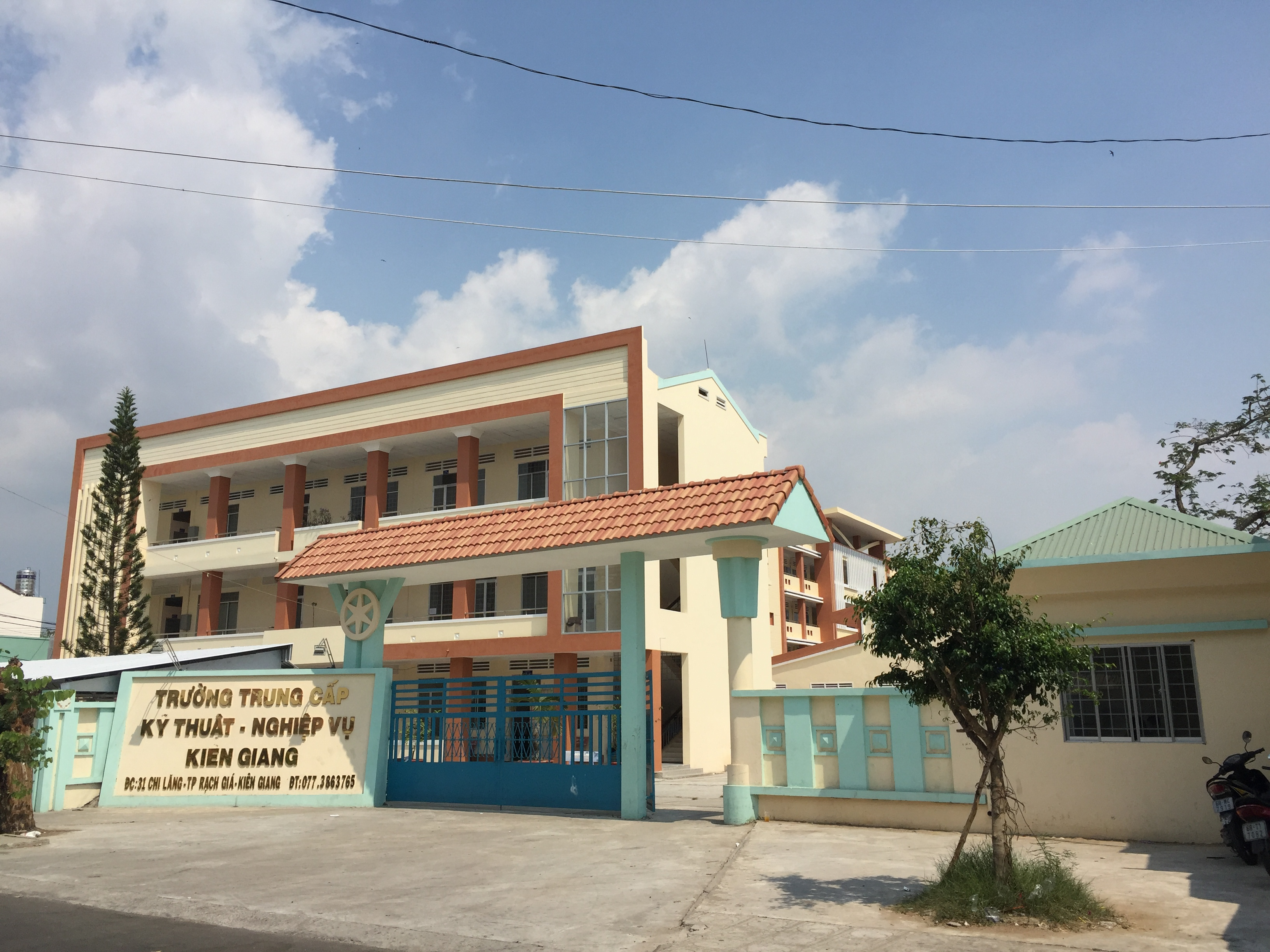 31 Chi Lăng, phường Vĩnh Bảo, Thành phố Rạch Giá, Kiên Giang